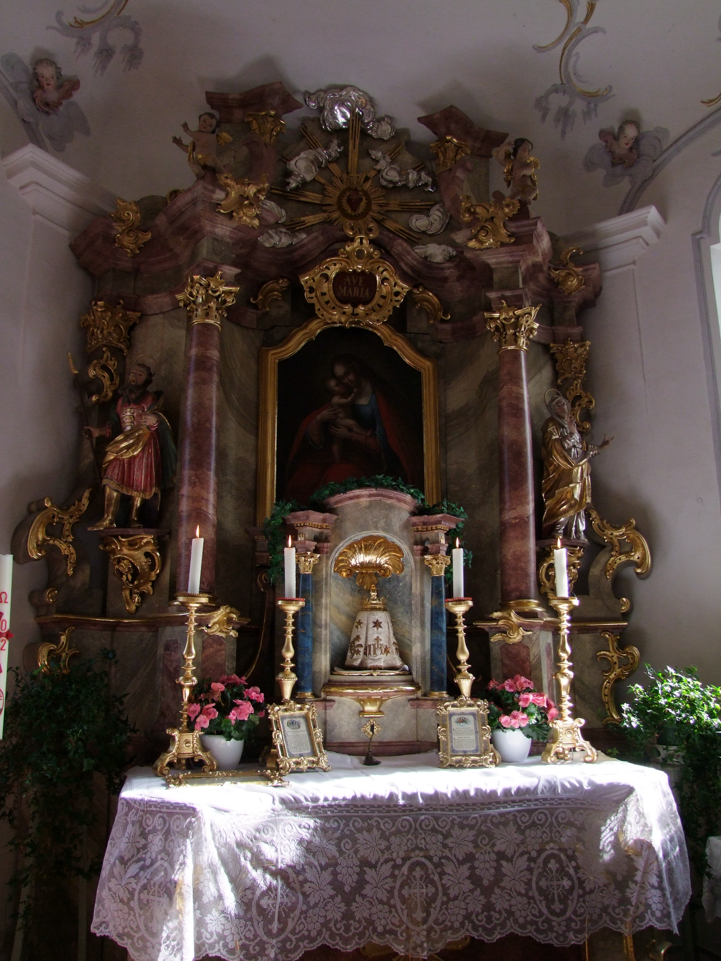 Unserer Lieben Frau im oberschwäbischen Oberrammingen,, Ortsteil von Rammingen in Bayern/Schwaben